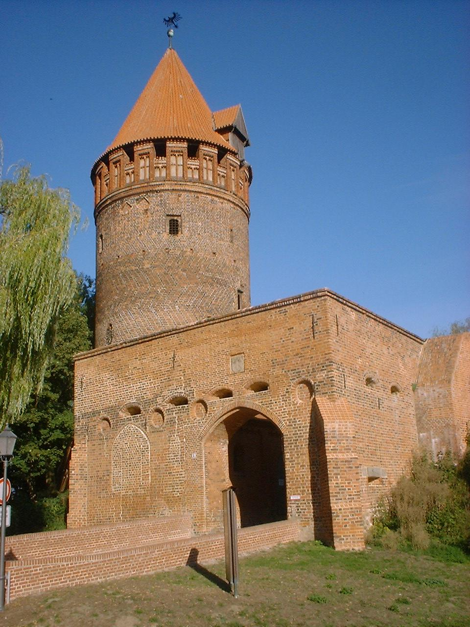 Gefängnisturm in Tangermünde in Sachsen-Anhalt, Deutschland